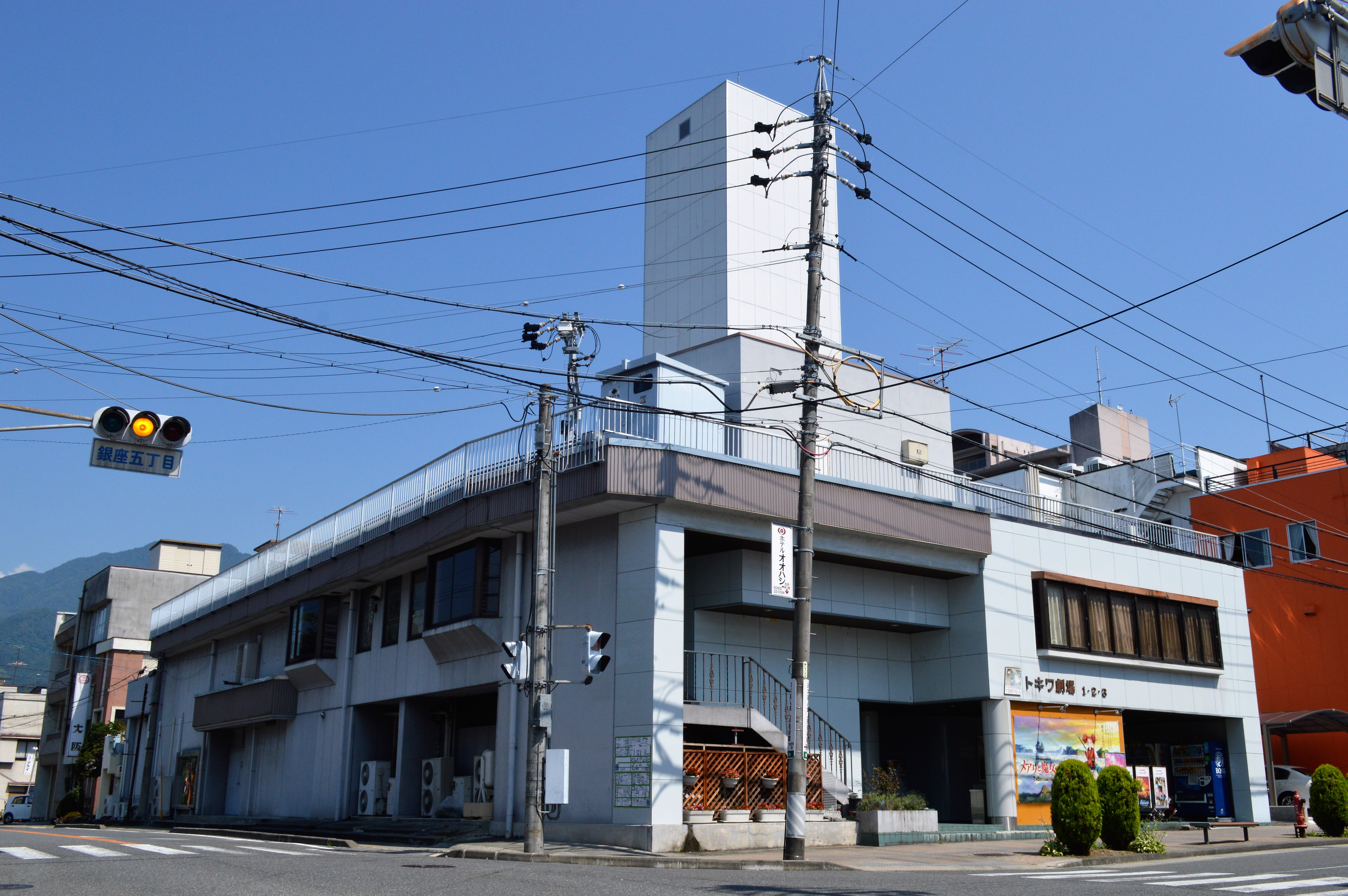 長野県飯田市の映画館「飯田トキワ劇場」。